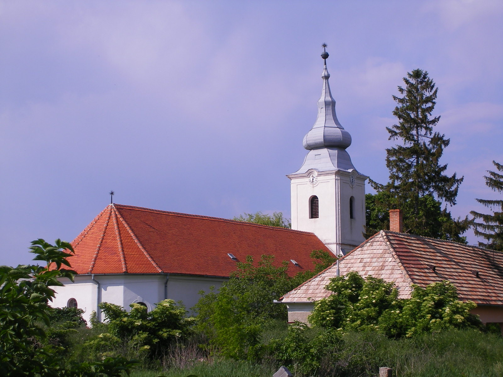 Kamocsa - református templom